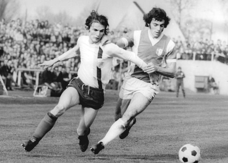 ADN-ZB-Liebers-30.3.1974-schw-Gera: Fußball-Oberliga, FC Carl Zeiss Jena - 1. FC Magdeburg 1:2 - Im Ernst-Abbe-Sportfeld von Jena setzte sich der 1. FC Magdeburg an die Spitze der DDR-Oberliga-Tabelle. Unser Foto zeigt ein Duell zwischen Martin Goebel (Jena - l.) und Axel Tyll während der Begegnung am 30.3.1974.